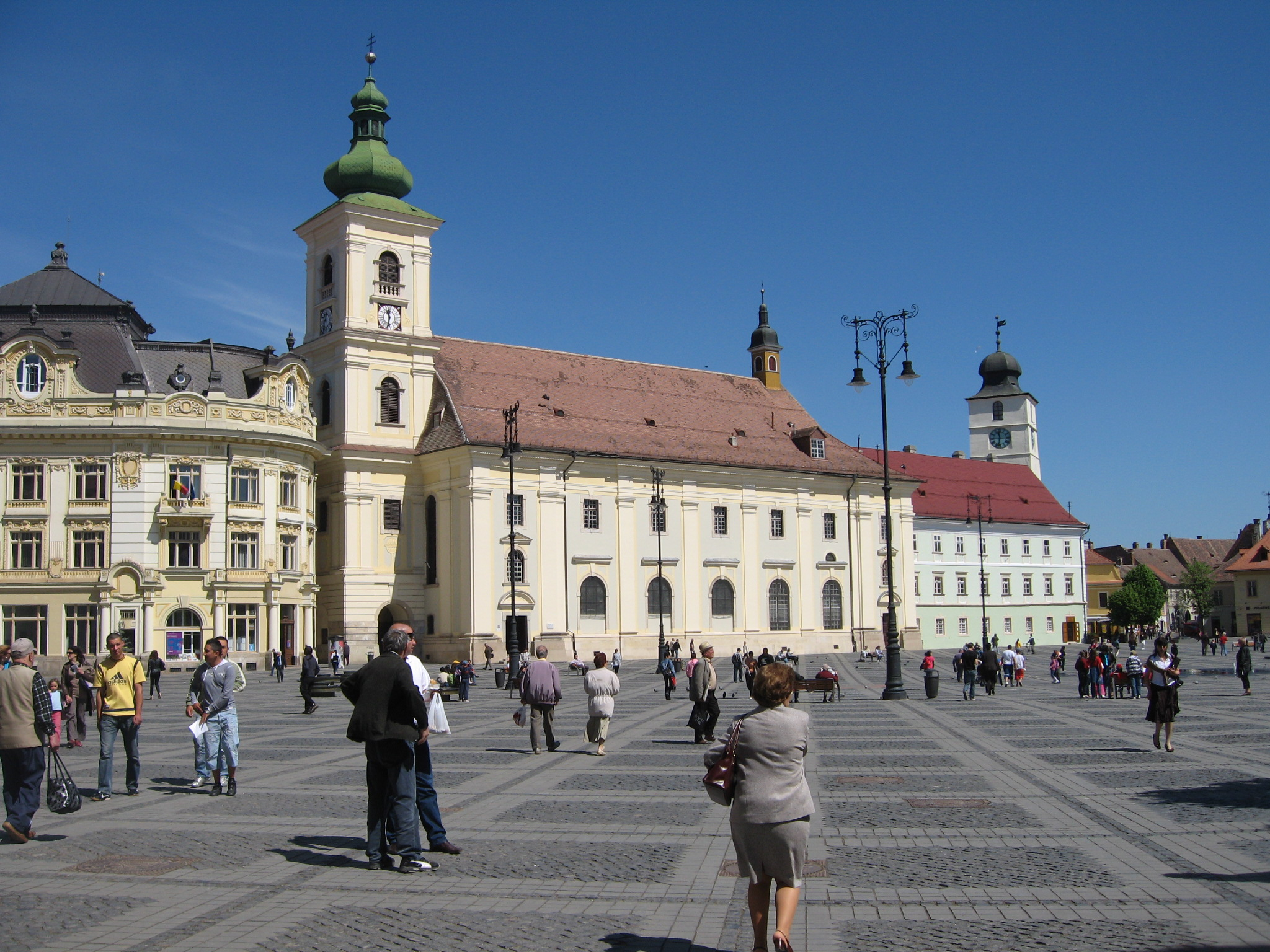 Biserica romano-catolica din Sibiu